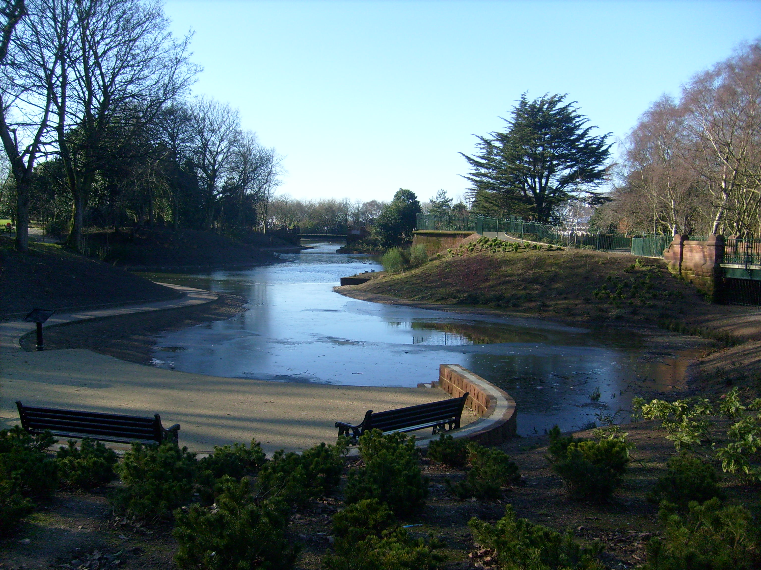 Stanley Park Feb 11 2010